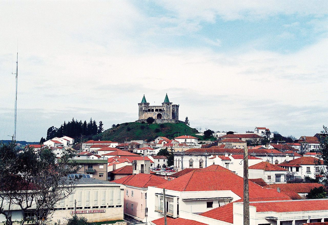 A fotografia está meio manhosa, mas o castelo é muito bonito.